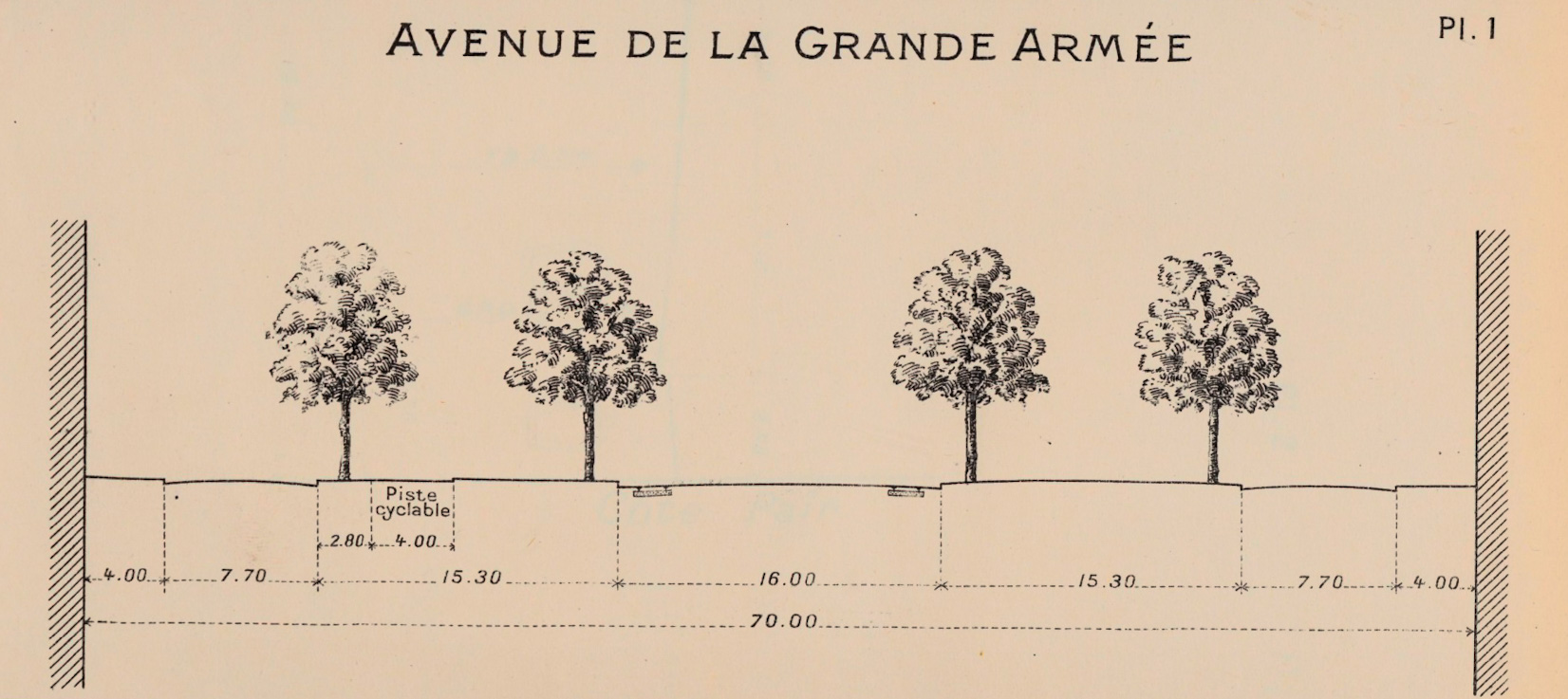 profil de l'avenue de la Grande Armee de1897 ~ 1937